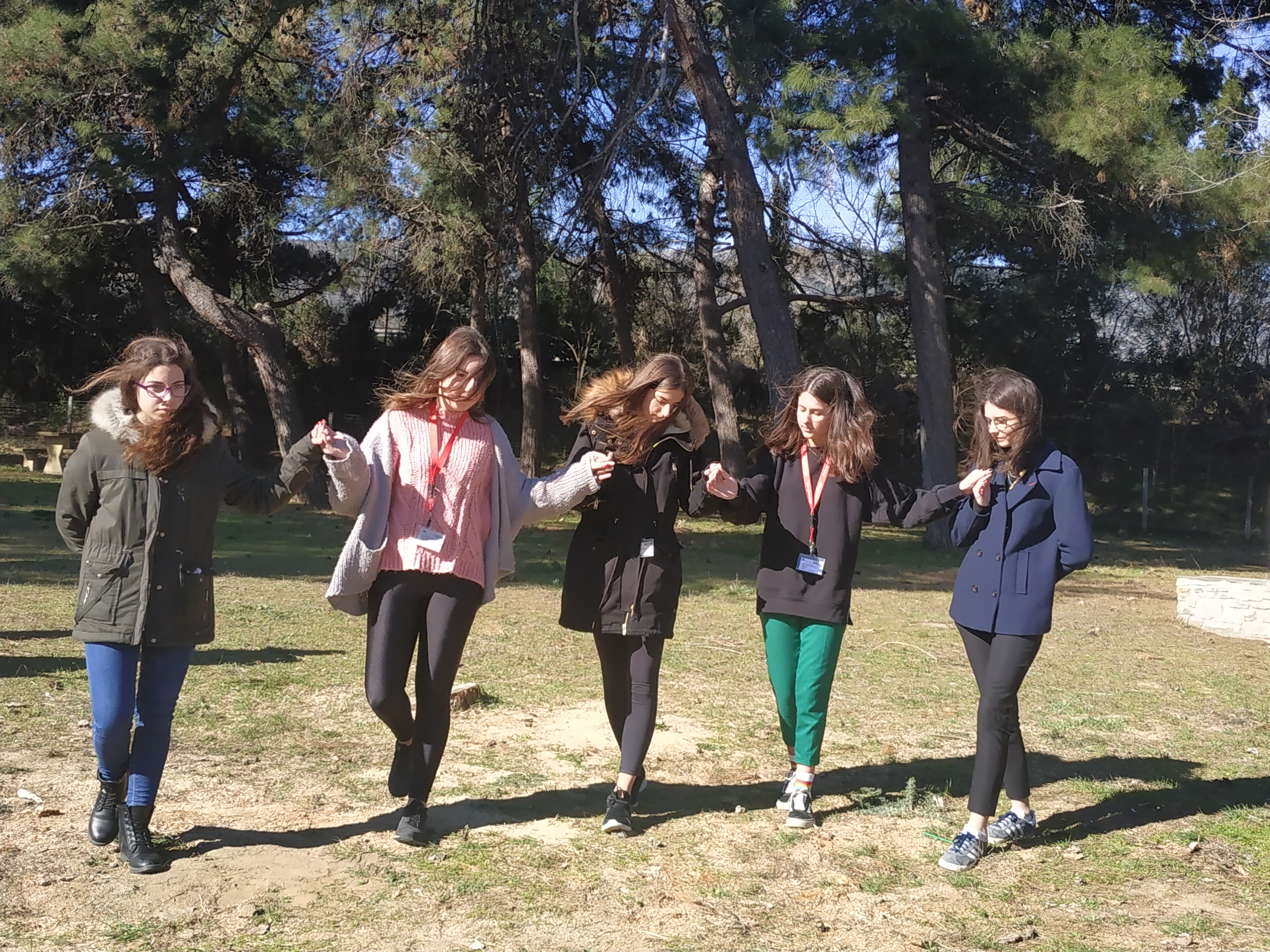 Pogonisios Dance Step 4